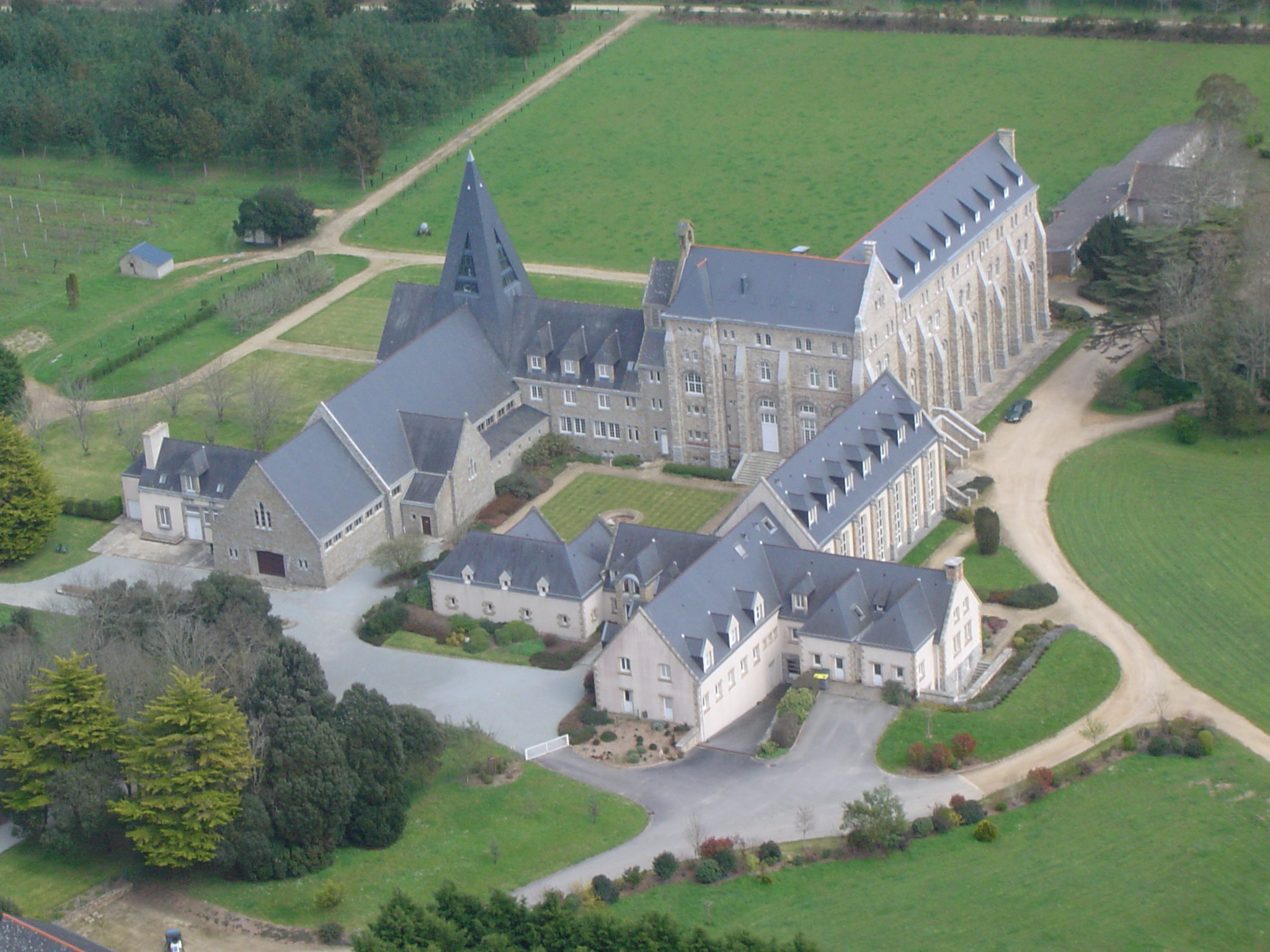 Vue aérienne du monastère bénédictin de Kergonan, presqu'ile de quiberon